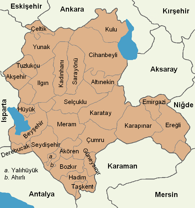 Konya'nın ilçelerini gösteren harita